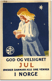 Julekort Viggo Guttorm Pedersen 143 for Danskehjelpen